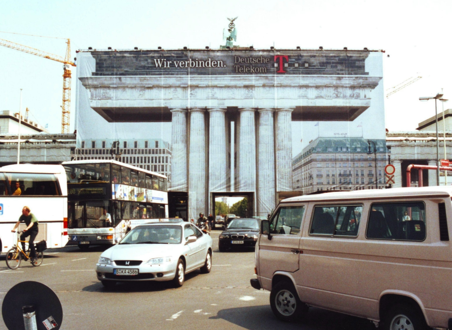 Brandenburger Tor, während Restauration verhüllt, Juni 2001